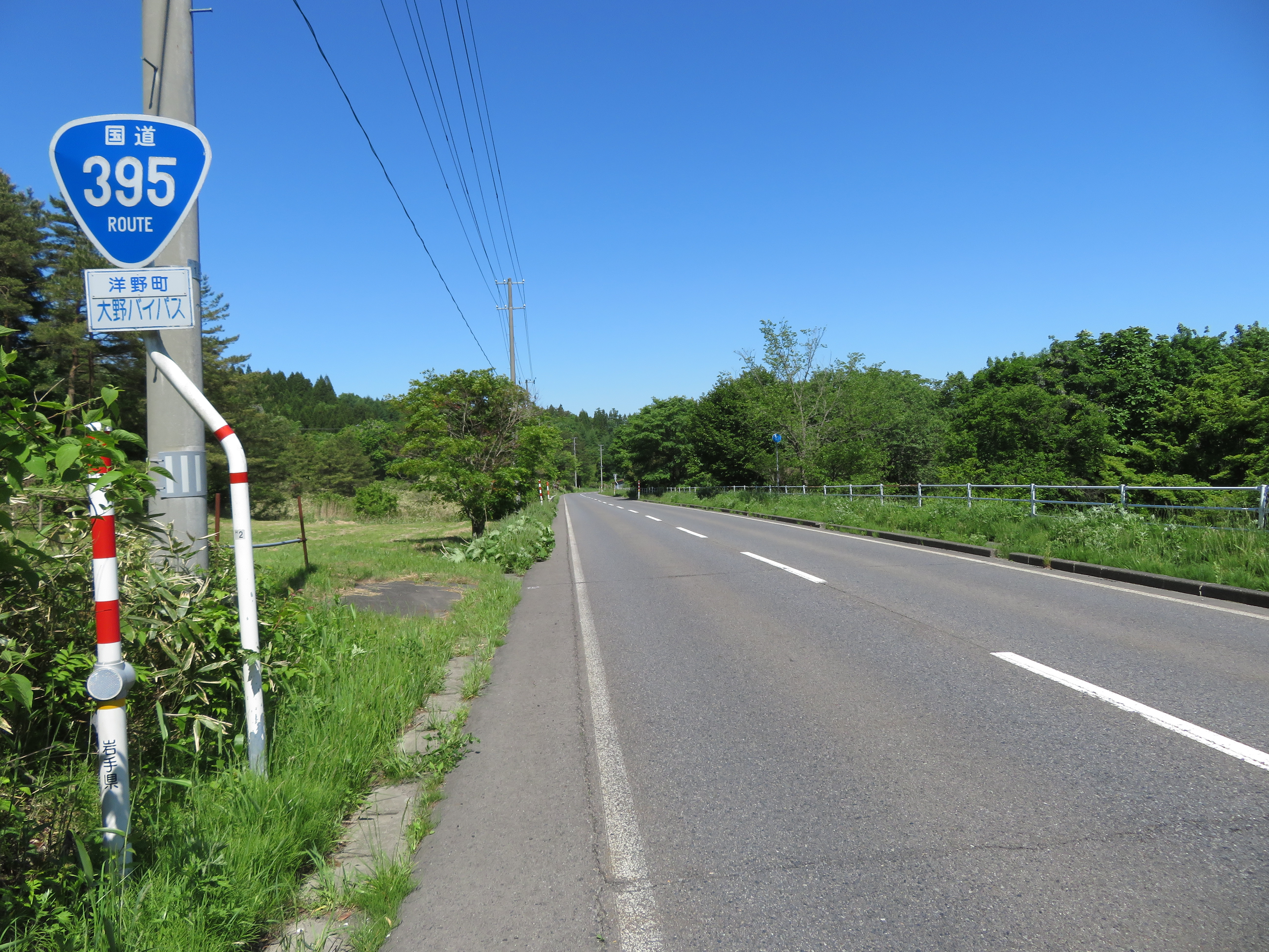 国道395号大野バイパス（岩手県九戸郡洋野町大野第59地割付近（軽米方面を撮影） Canon PowerShot SX720 HS